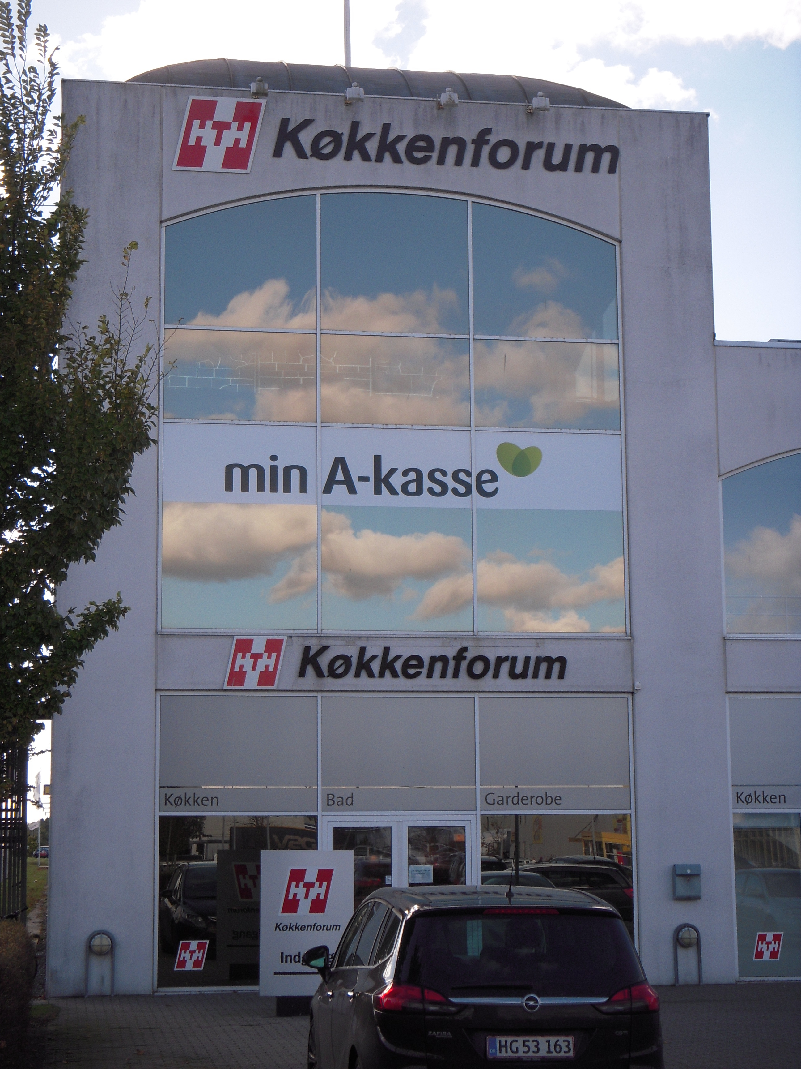 Min A-kasse's afdelingskontor i Aalborg ligger i samme bygning som bl.a. en HTH køkkenforretning.